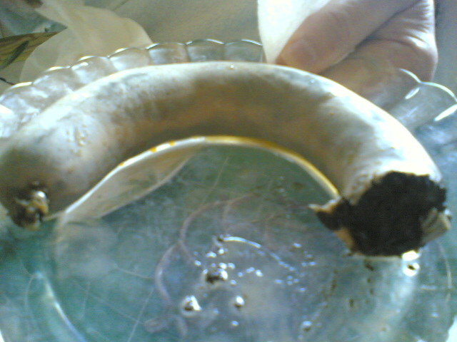 Chouriço de sangue, a portuguese blood sausage